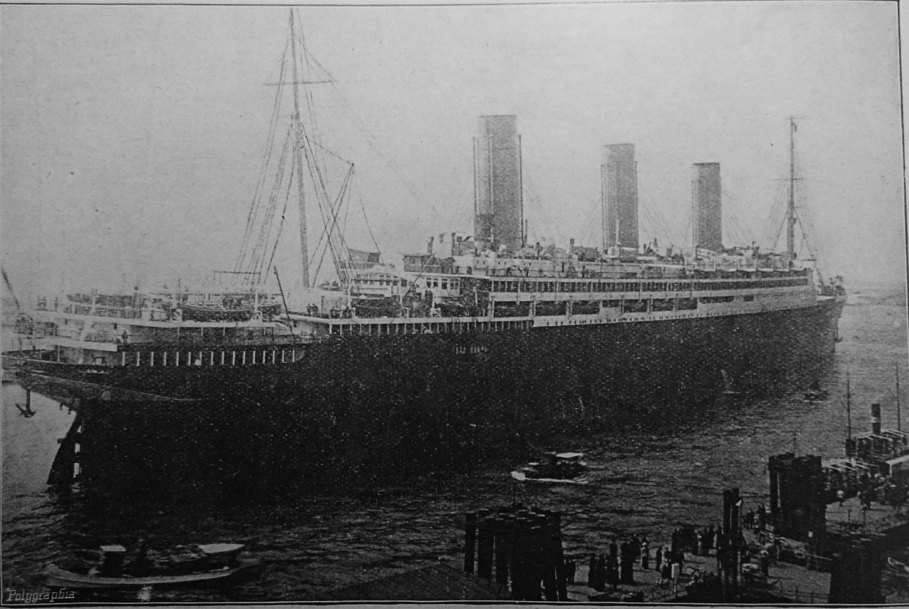 Parník světa "Imperator"